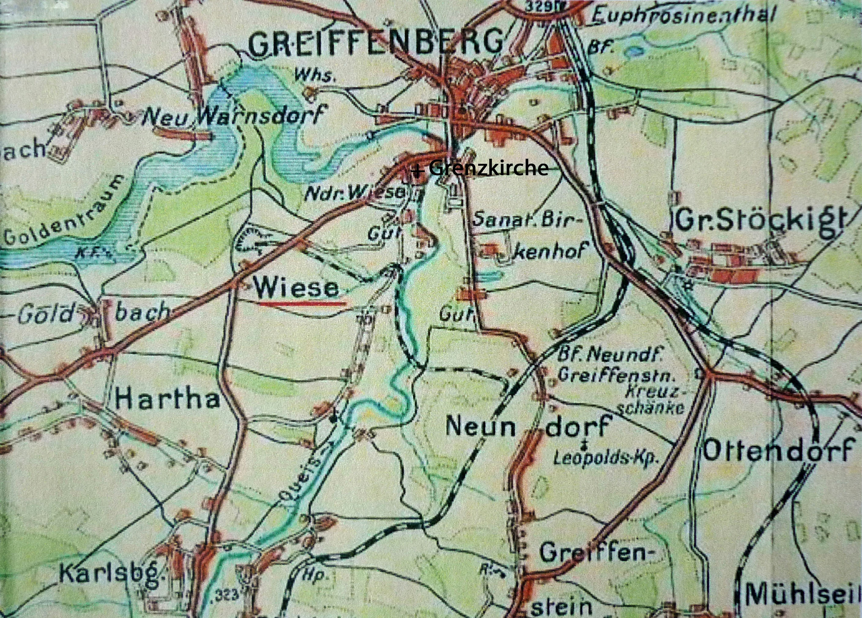 Landkarte von Wiesa bei Greiffenberg, jetzt Wieża (Gryfów Śląski), in Niederschlesien mit eingetragener Lage der ehem. Grenzkirche